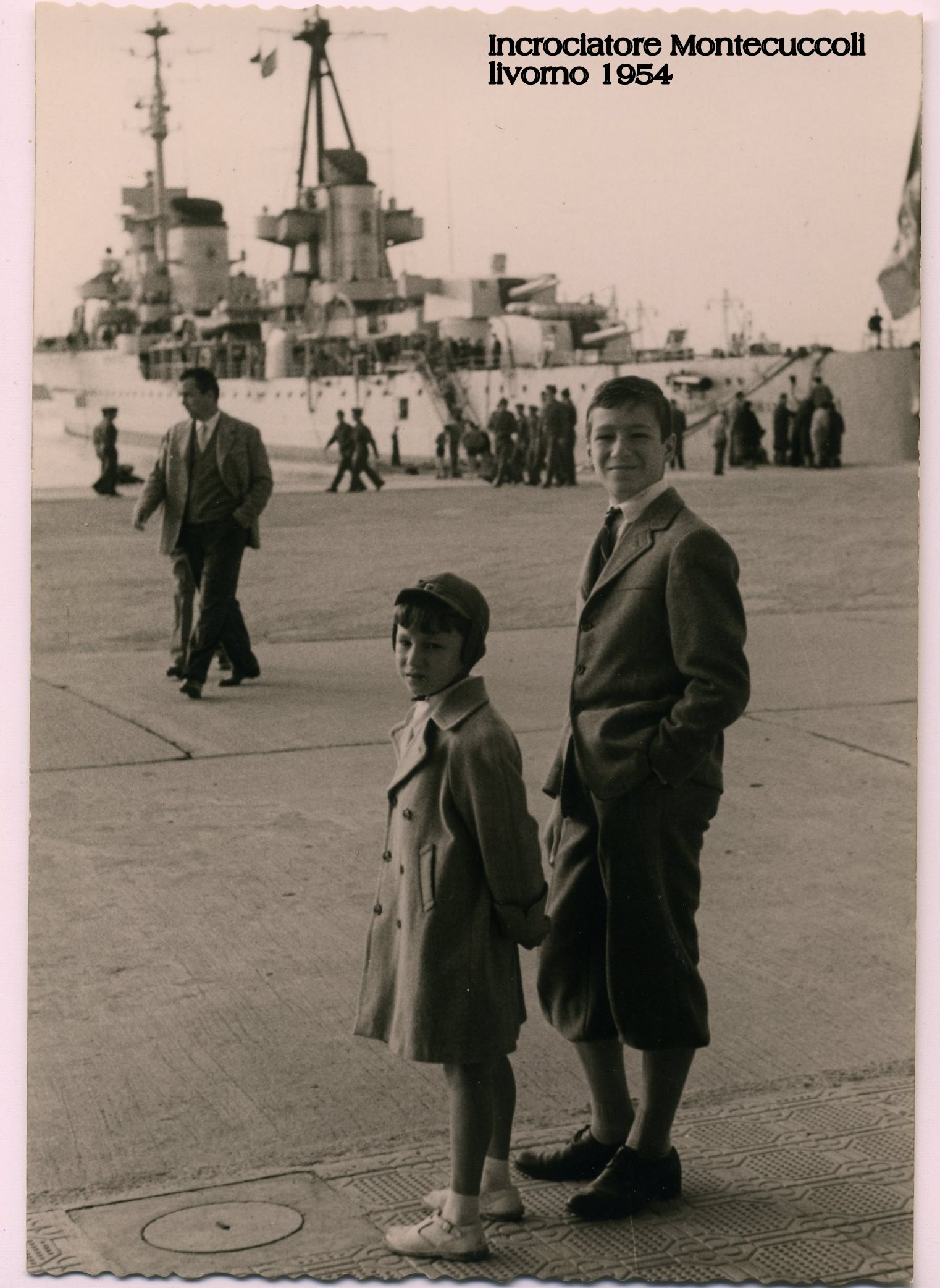 Incrociatore Montecuccoli, Livorno